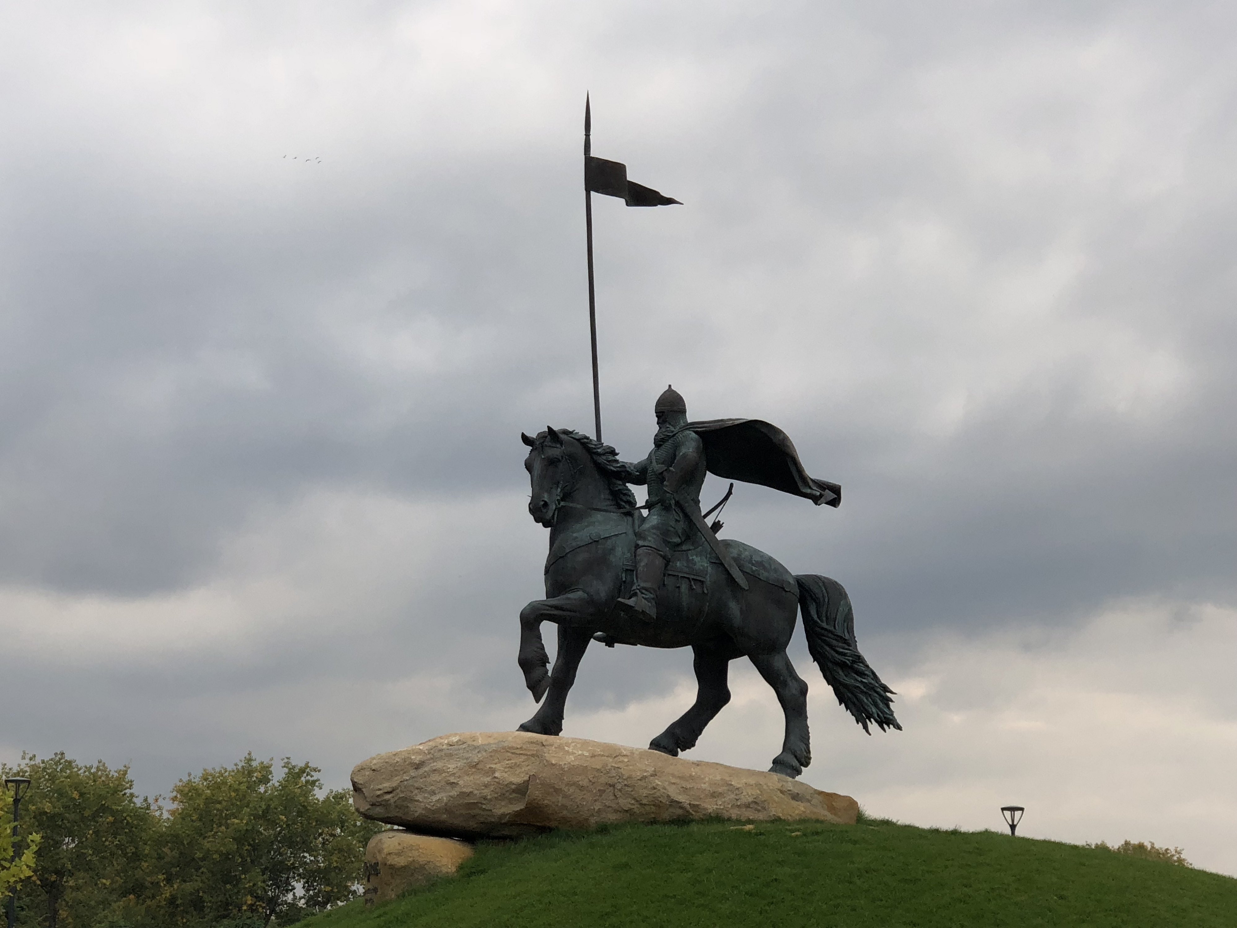 На фото Пам'ятник Іллі Муромцю, що знаходиться в Києві. Автор - Володимир Журавель.